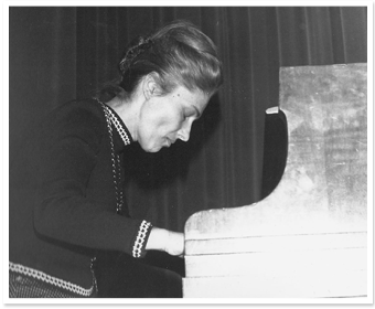 Renata Zatti in the 1970s